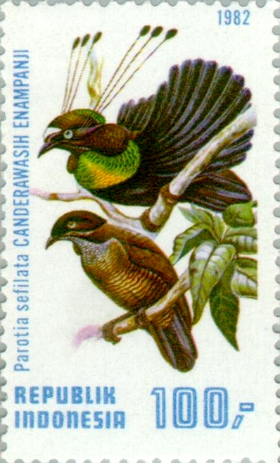 Parotia sefilata